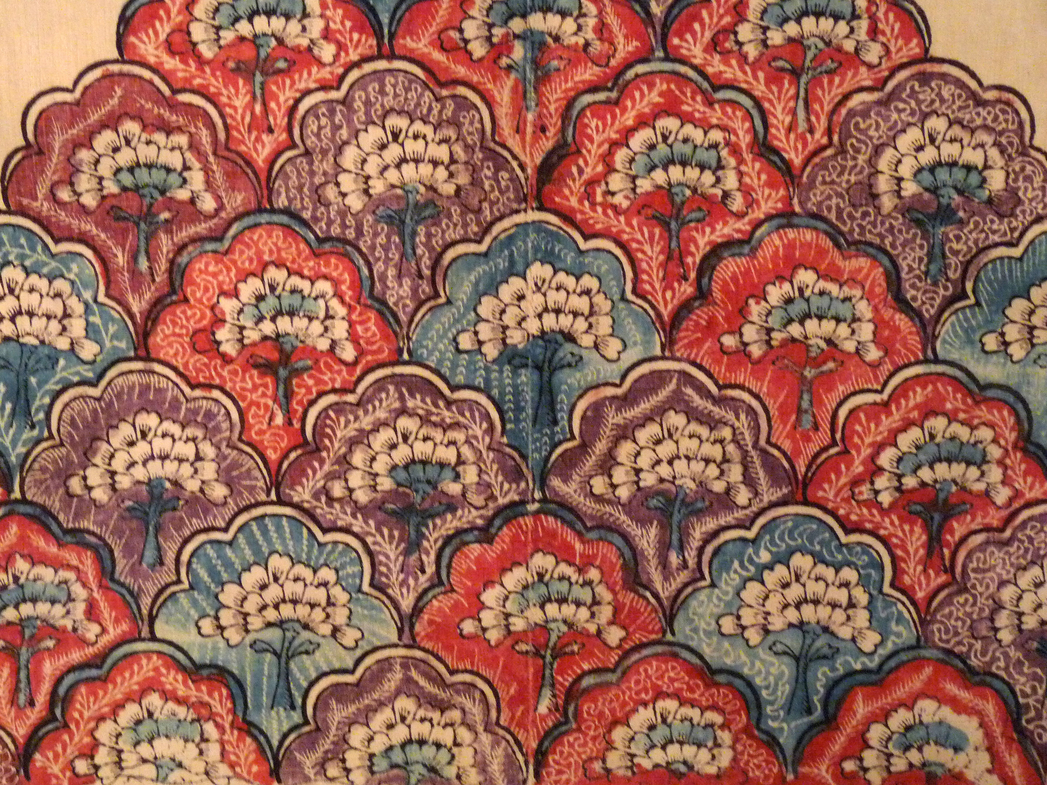 Palempore aux paons (détail). Coton teint, peint par mordançage et réserve. Inde, Côte de Coromandel. Seconde moitié du 18e siècle. Musée de la Compagnie des Indes (Lorient)